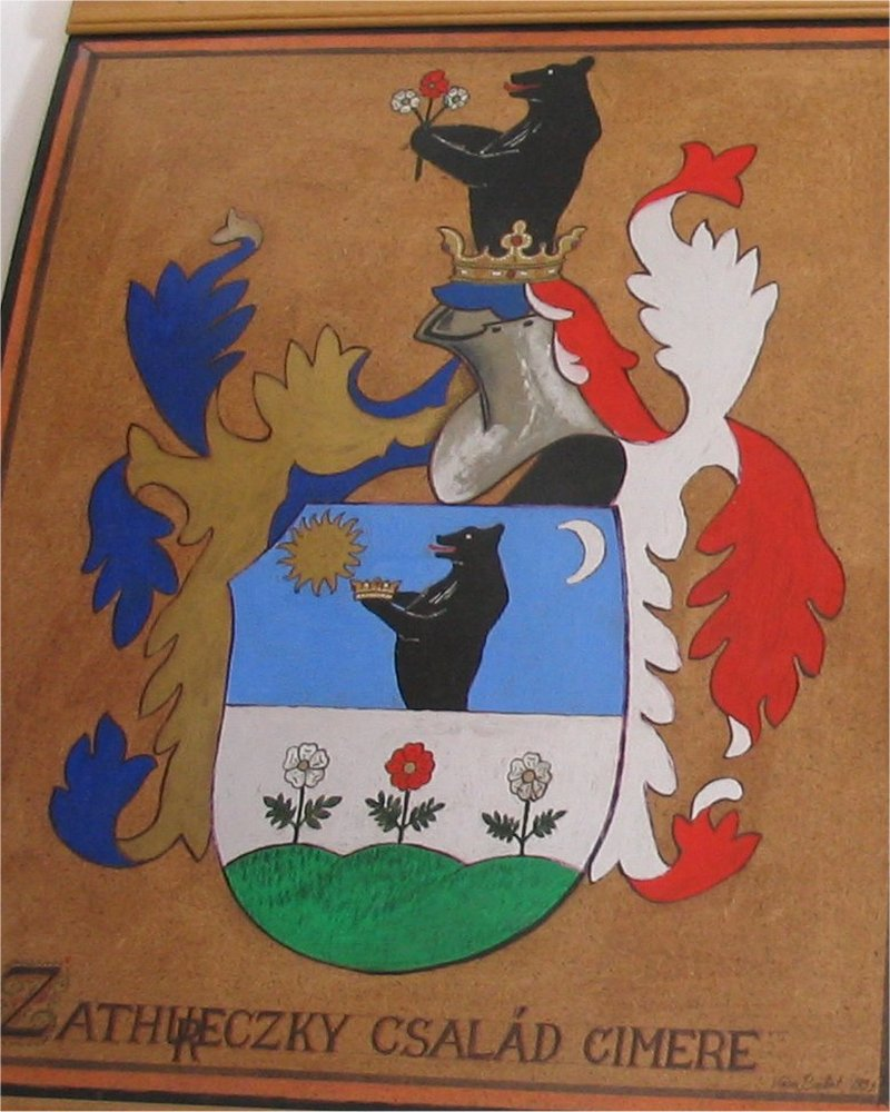 Zatureczky család címere az olaszteleki református templomban, 2007